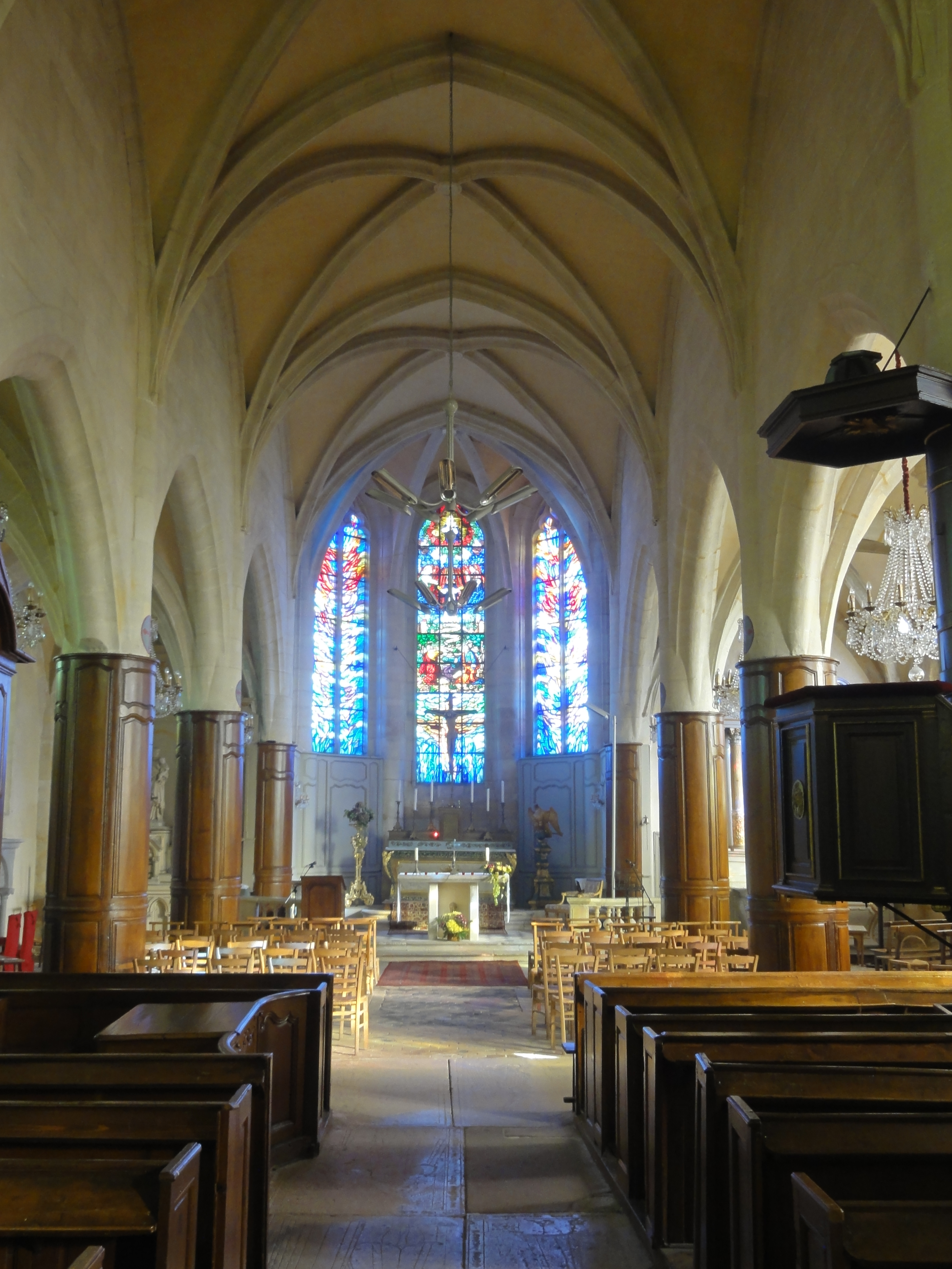 Nef, vue vers l'est.